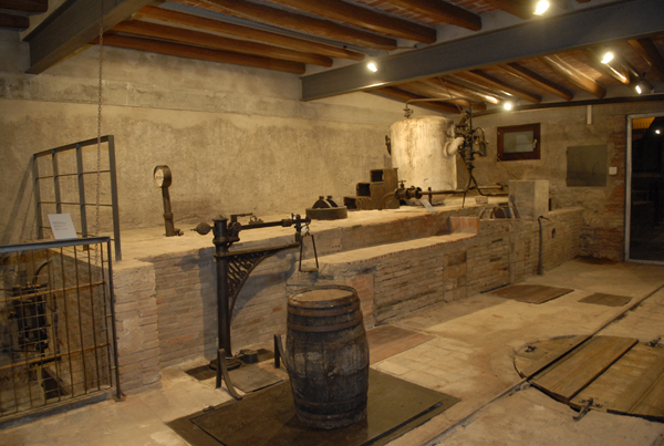 Part de l'interior del Museu de la Fassina Balanyà de l'Espluga de Francolí